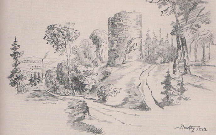 Deutschland - Nordrhein-Westfalen - Kreis Lippe - Bad Salzuflen, Ortsteil Wüsten: Stumpfer Turm, Bleistiftzeichnung von Carl Dewitz (* 1852)